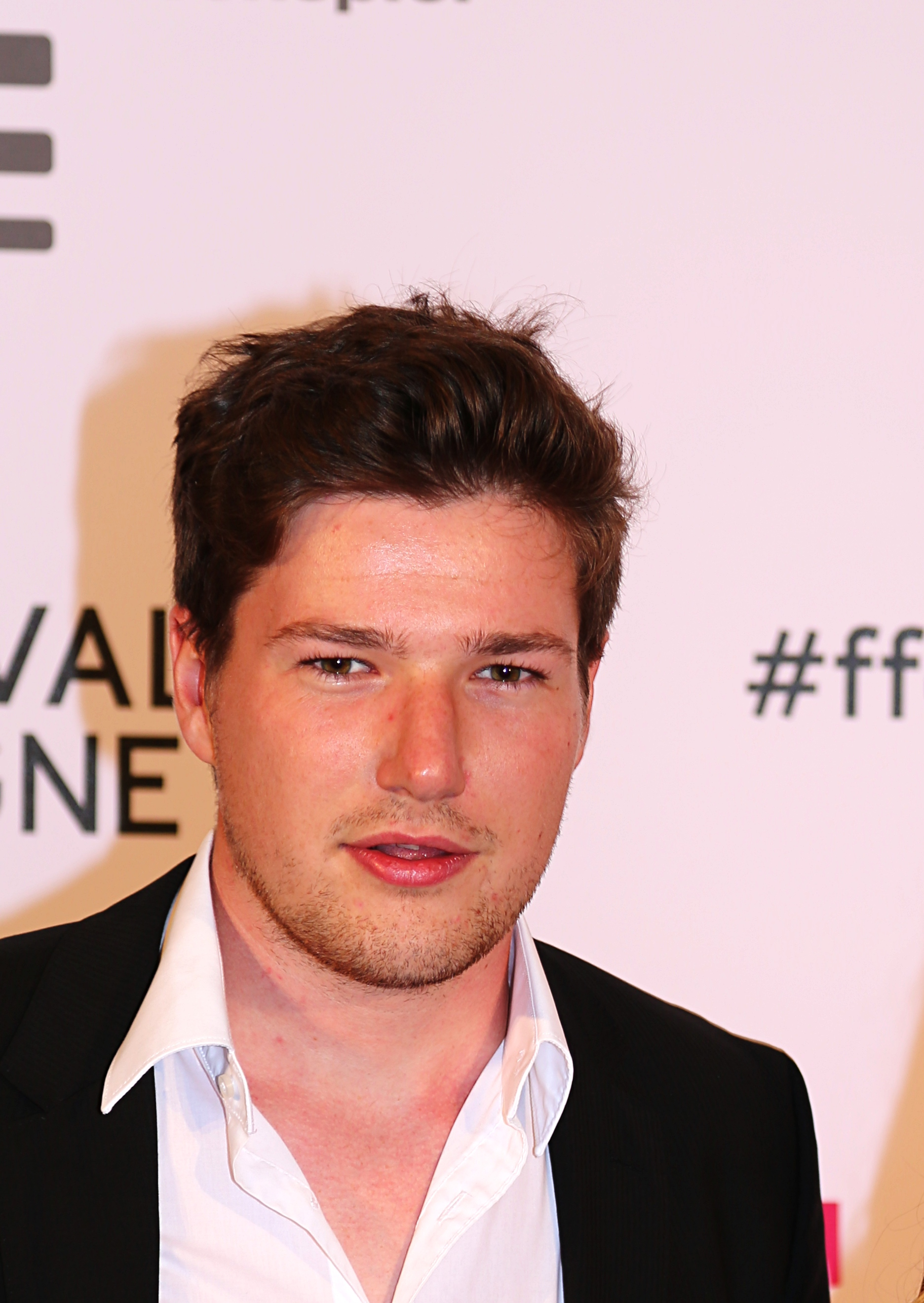 Etienne Heimann bei der Verleihung der "Film Festival Cologne Awards 2017".